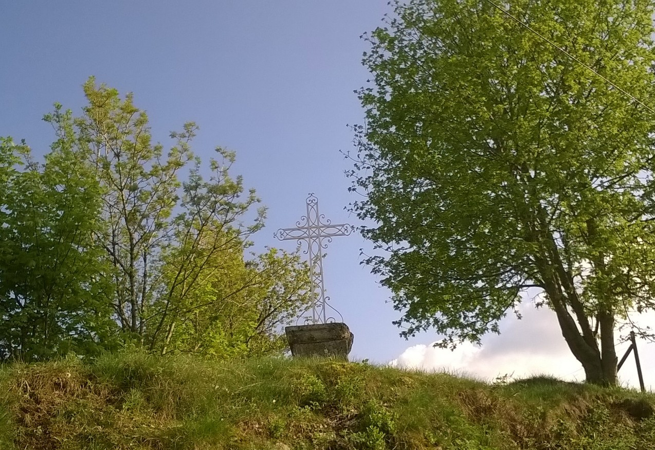 montregard6